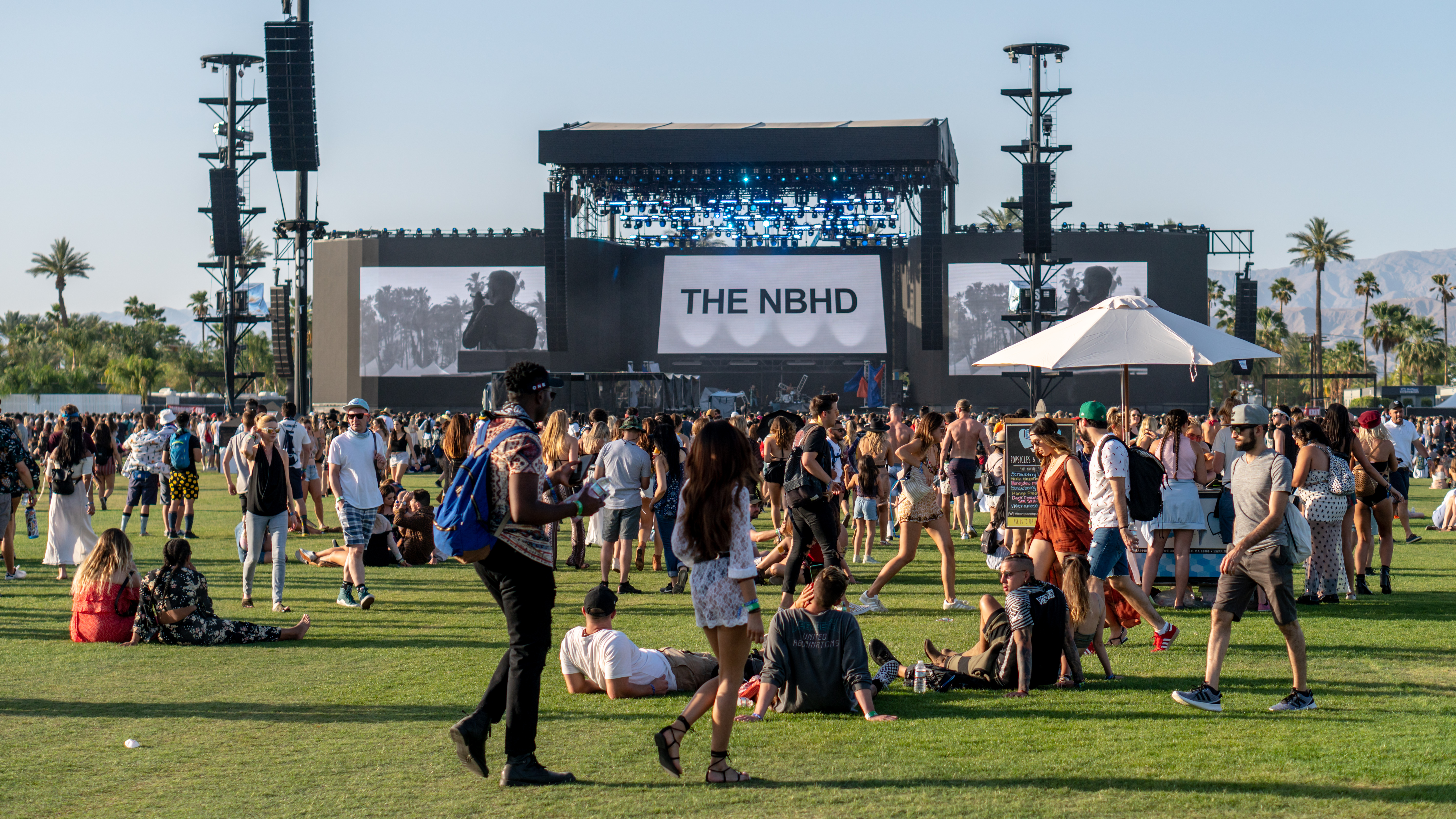 Coachella18W1-10